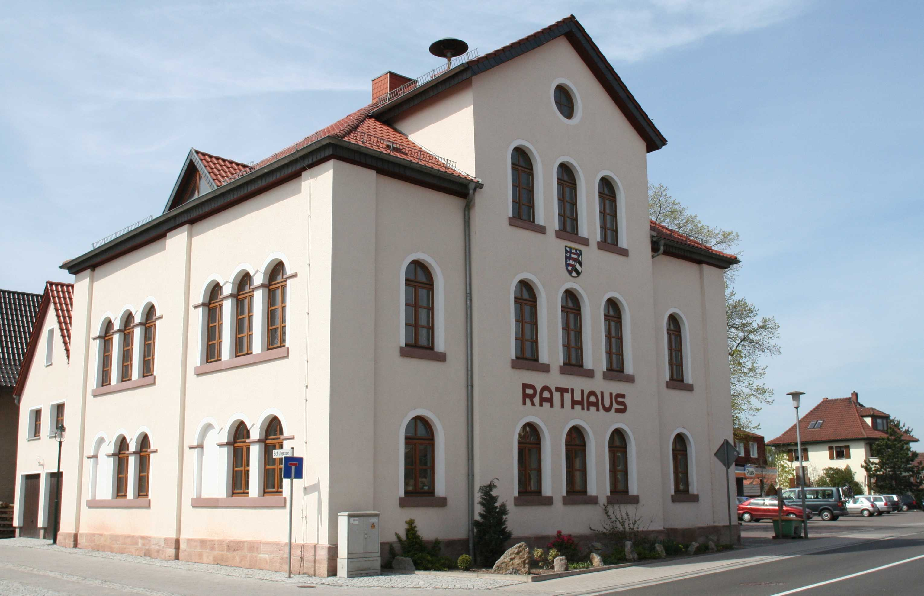 Rathaus in Barchfeld, Landkreis Wartburgkreis